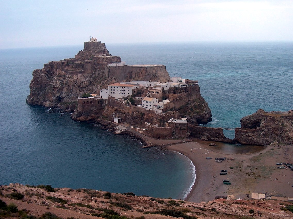 Peñon de Vélez de La Gomera (España)